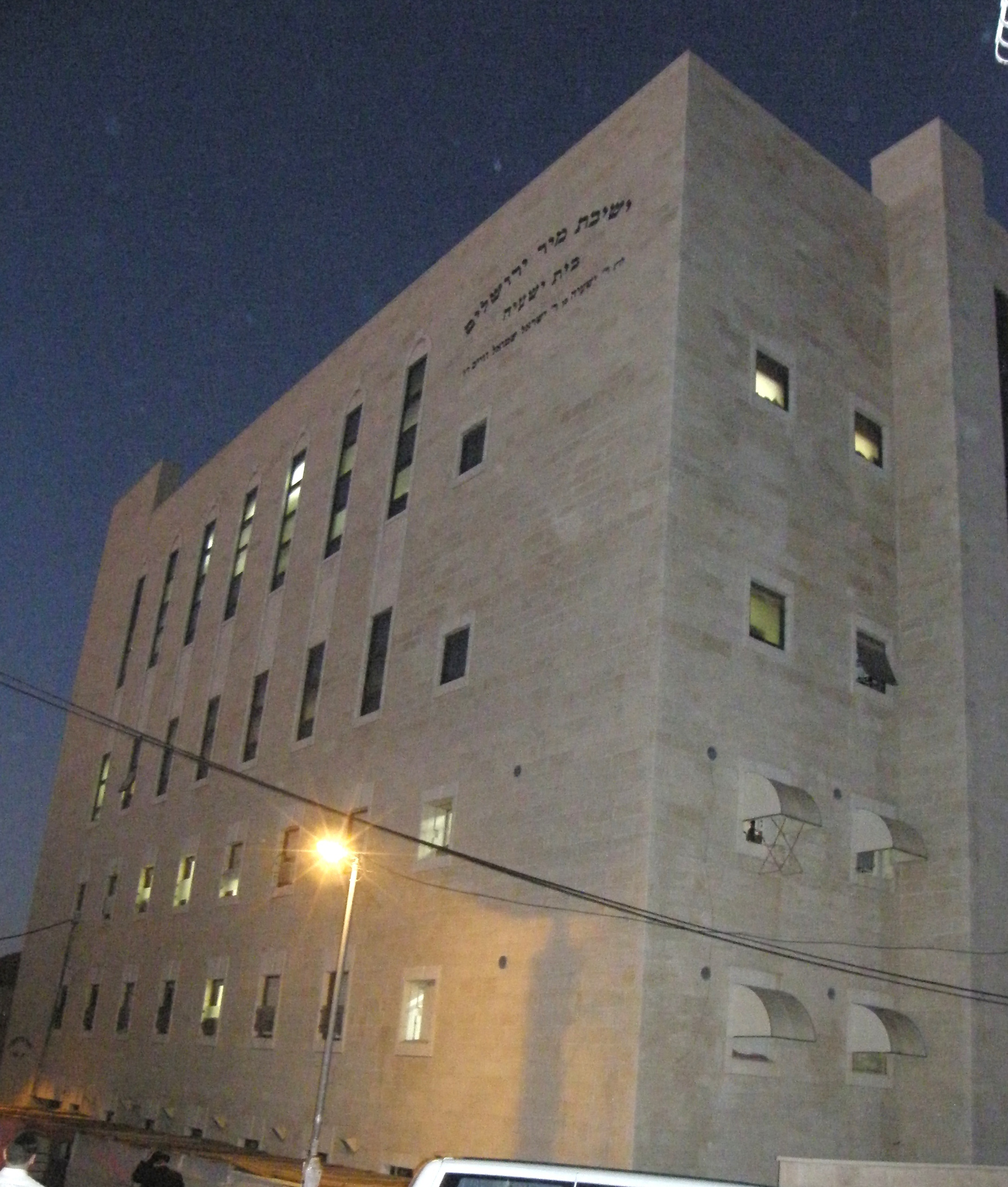 ישיבת מיר בנין בית ישיעה בשכונת בית ישראל